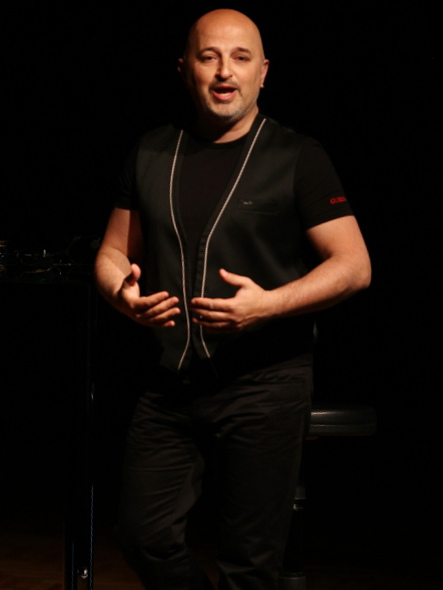 Yavuz Seçkin